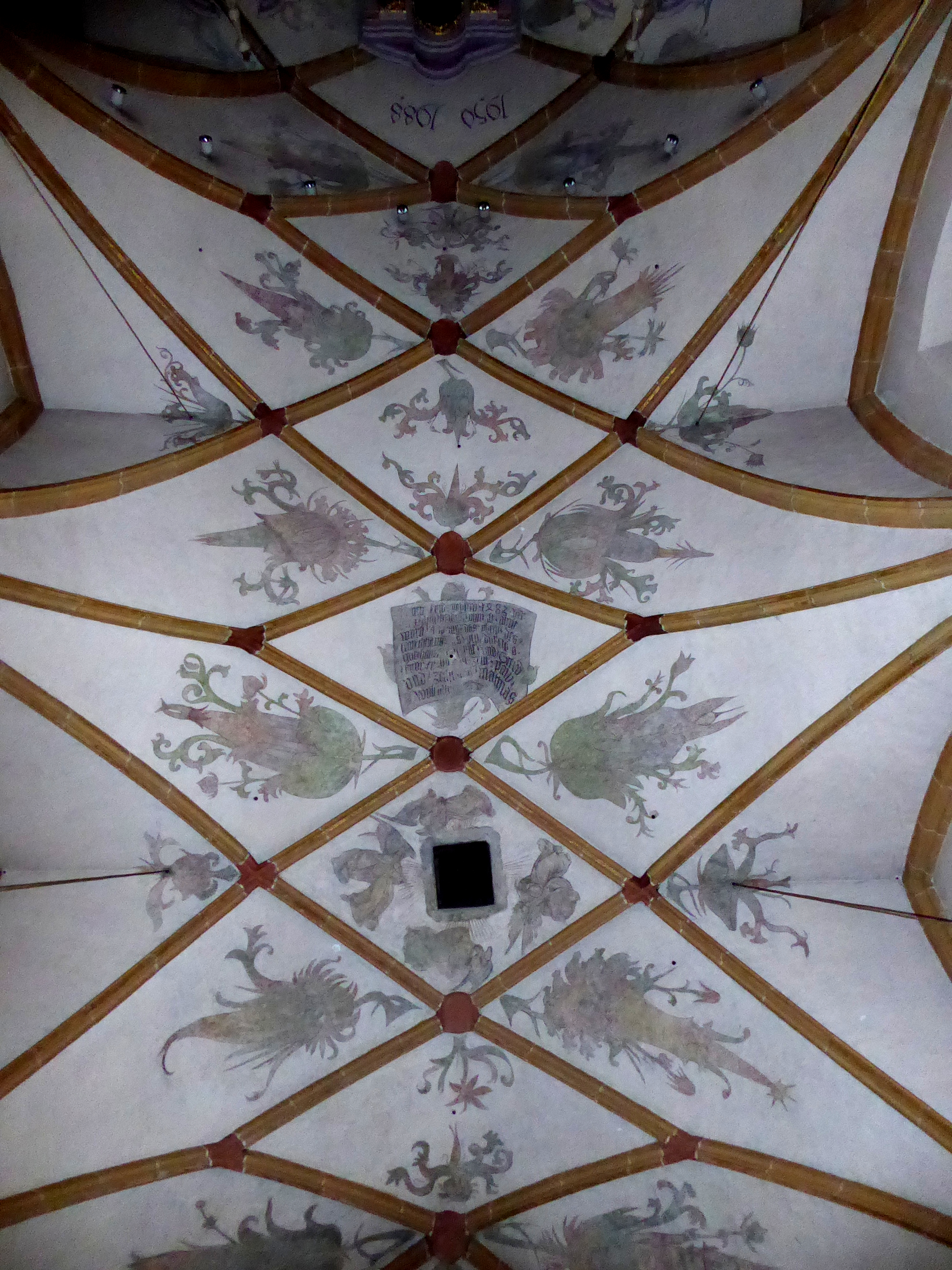 Pfarrkirche Maria am Waasen, Waasenstraße 27, Leoben, Steiermark, Österreich - Deckenmalerei